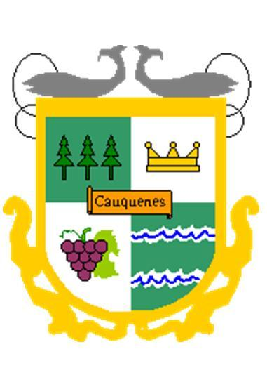 Escudo_Cauquenes.jpg